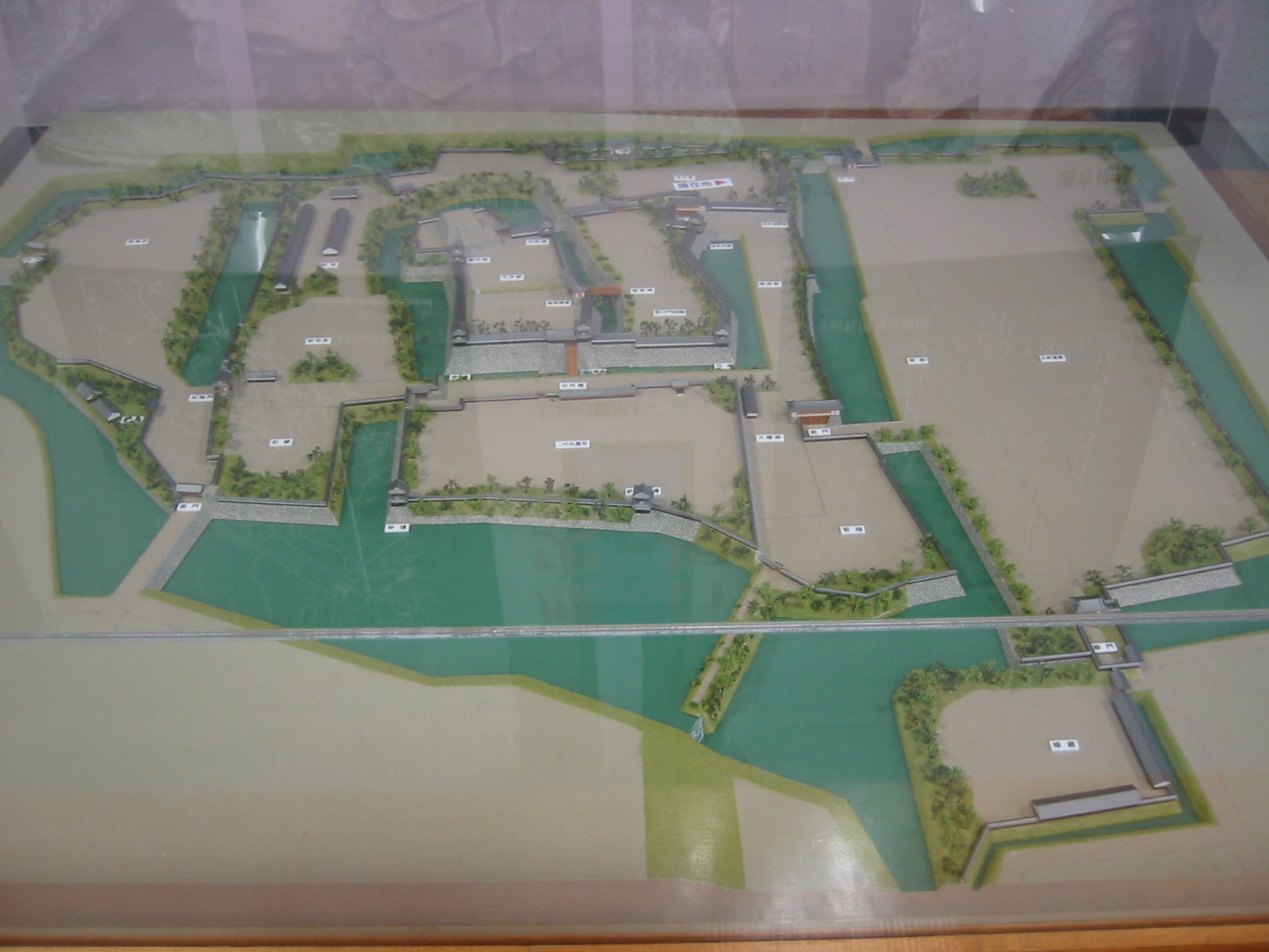 Kooriyama Castle